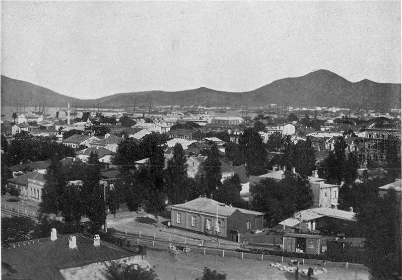 Batumi, Hafen, Georgien